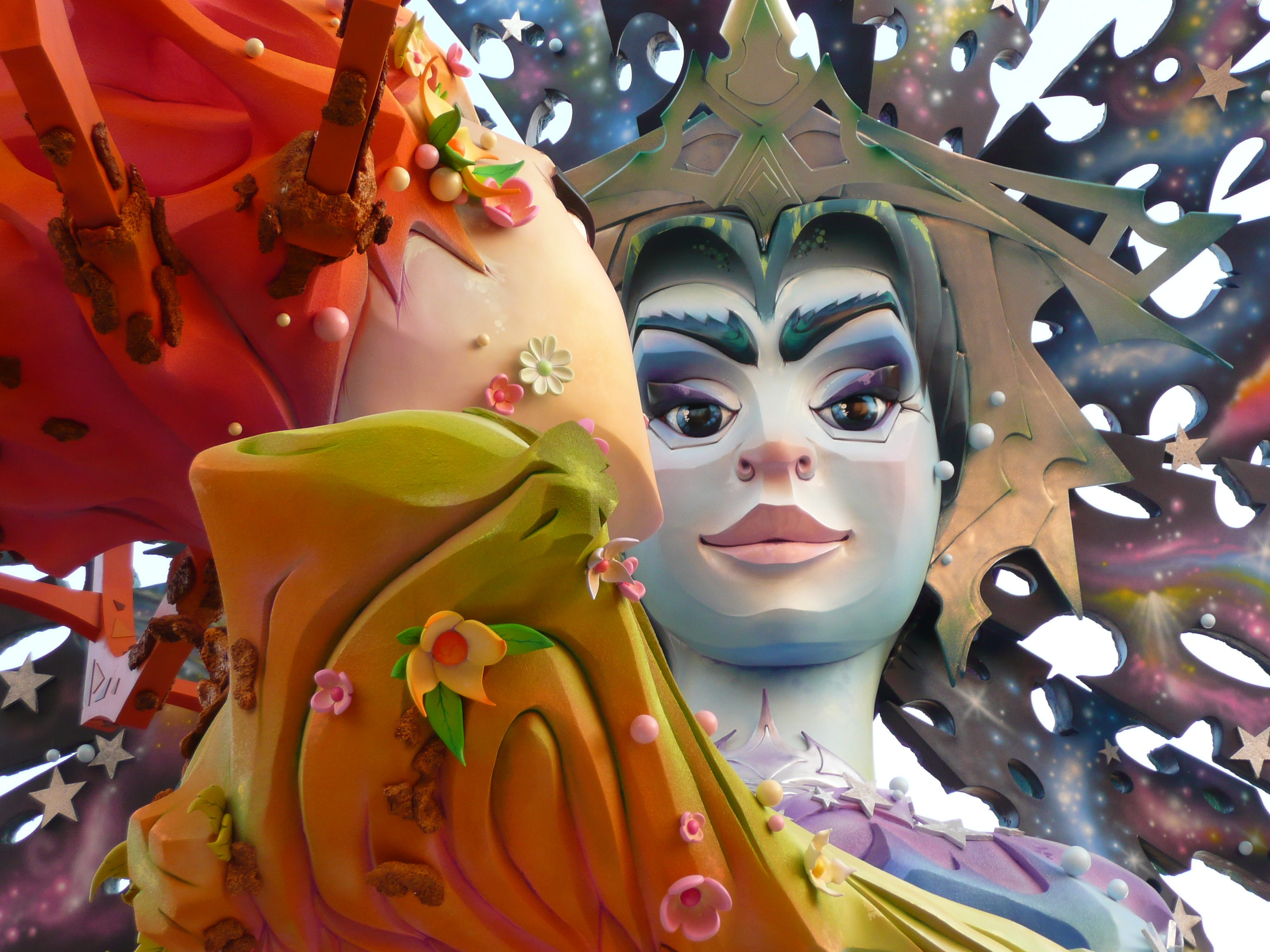 Hogueras 2008 - Gran Via La Ceramica